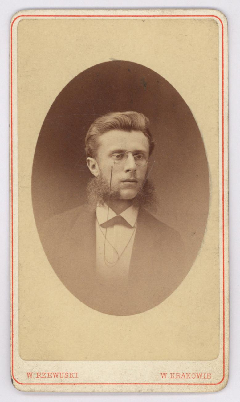 Kazimierz Bartoszewicz polski historyk, publicysta, satyryk, wydawca i kolekcjoner sztuki